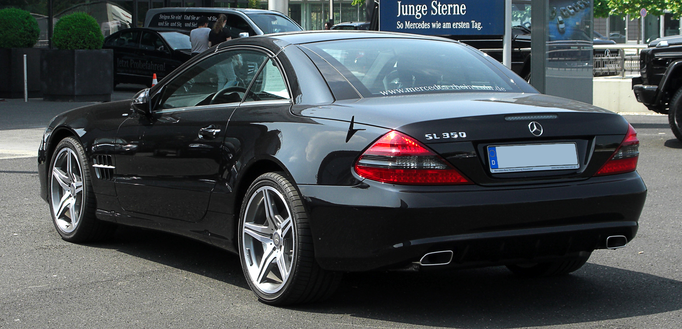 Mercedes-Benz SL 350 Night Edition (R 230, 2. Facelift)